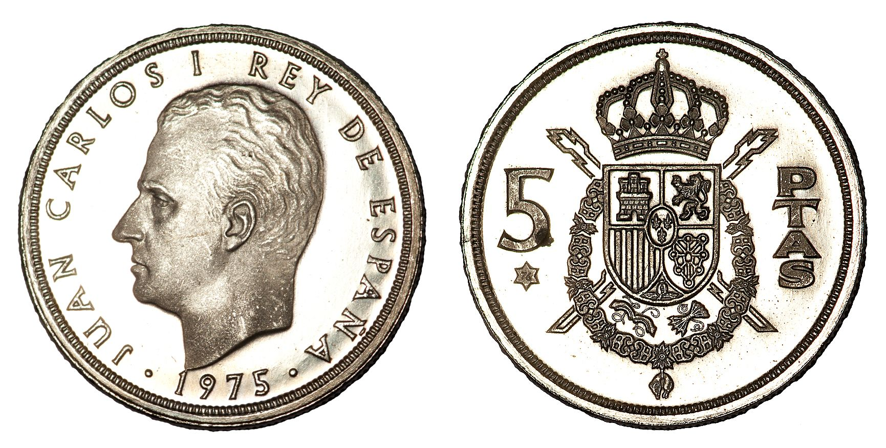 5 pesetas 1976, siendo aprobado el modelo en 1975